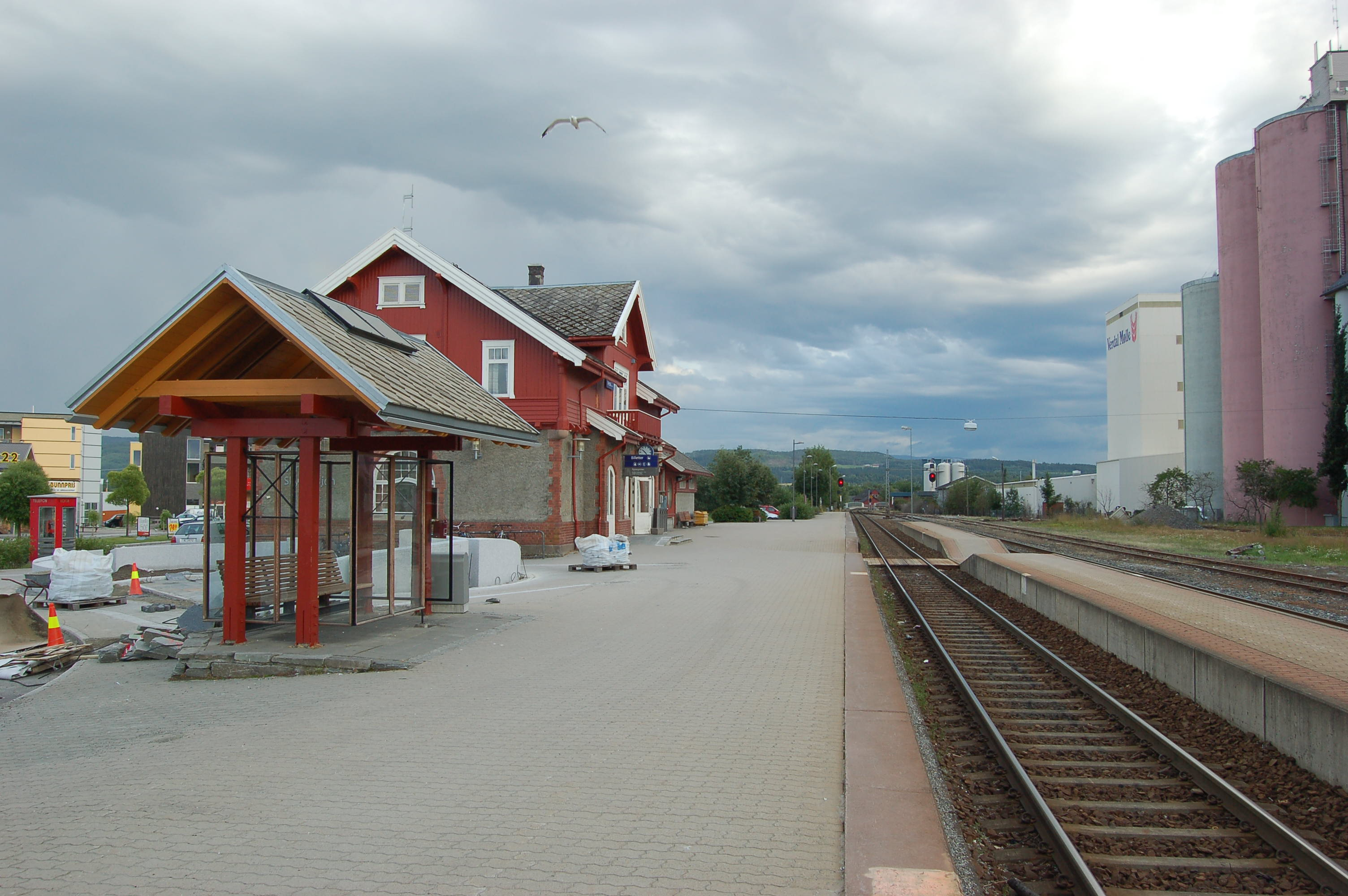 Verdal Station